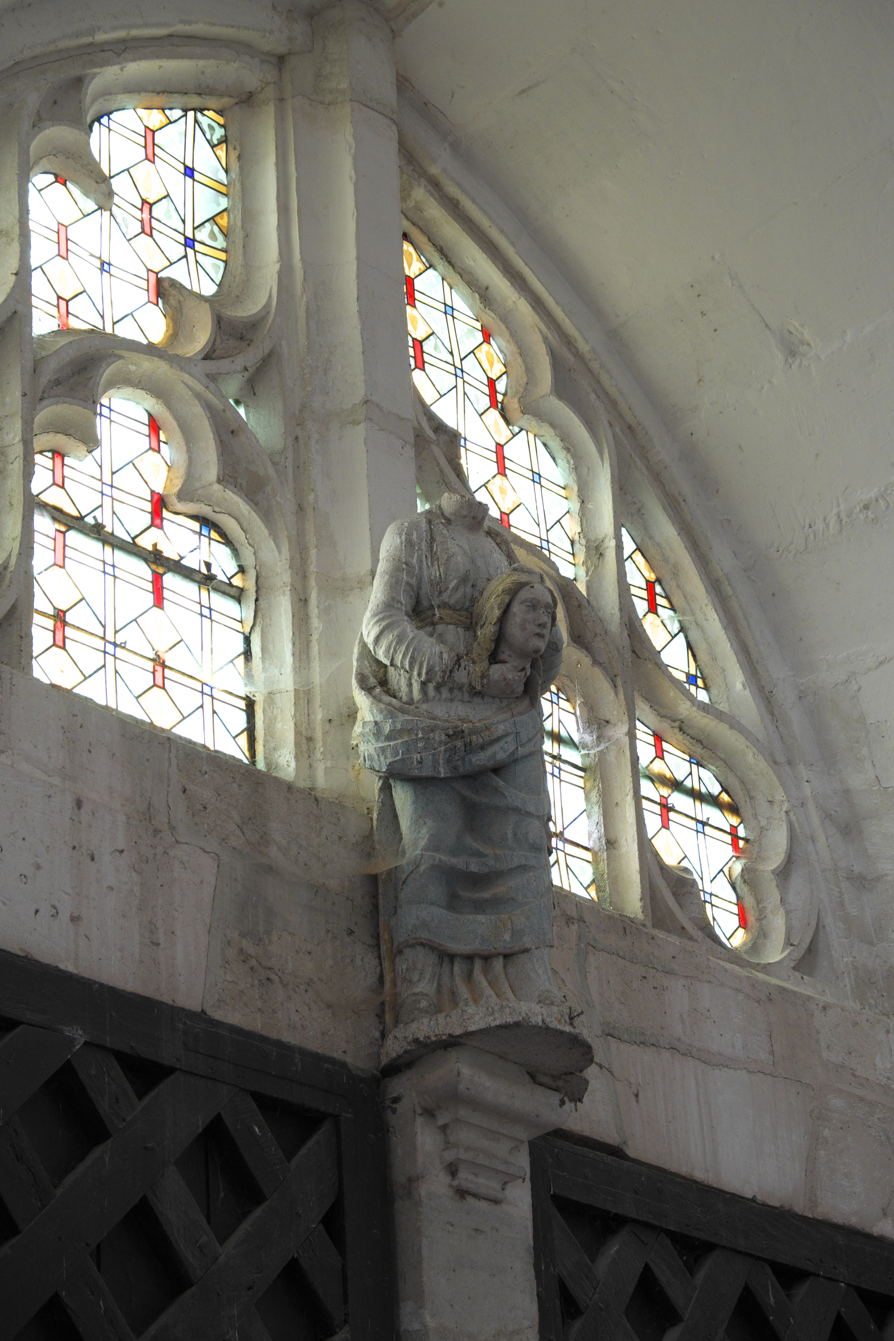 Katholische Kirche Sainte-Tanche in Lhuître im Département Aube (Champagne-Ardenne/Frankreich), heilige Tanche, Skulptur aus der 2. Hälfte des 16. Jahrhunderts